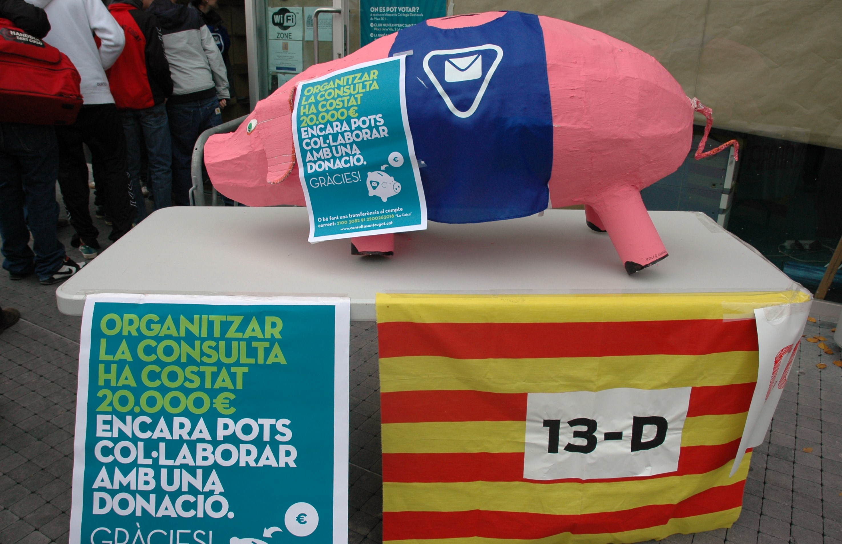 Sant Cugat - 13D